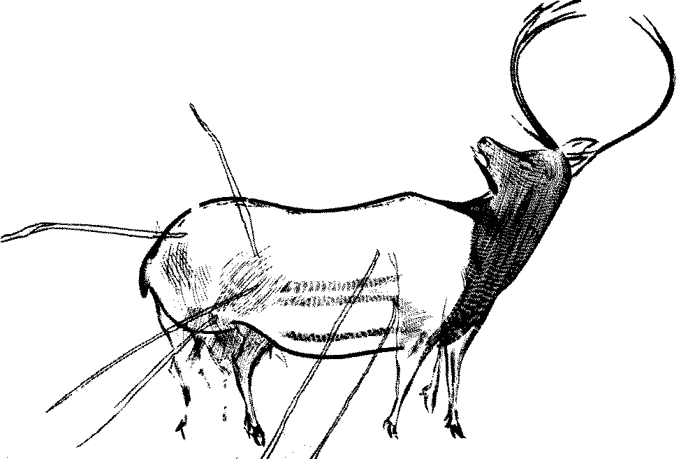 Ciervo herido de la cueva de la Peña de Candamo (San Román de Candamo, Asturias, España)